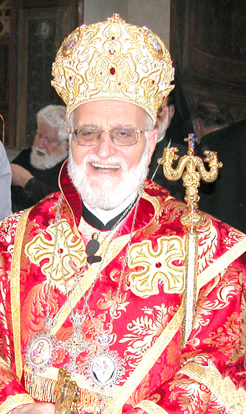 Gregorio III Laham in Rome